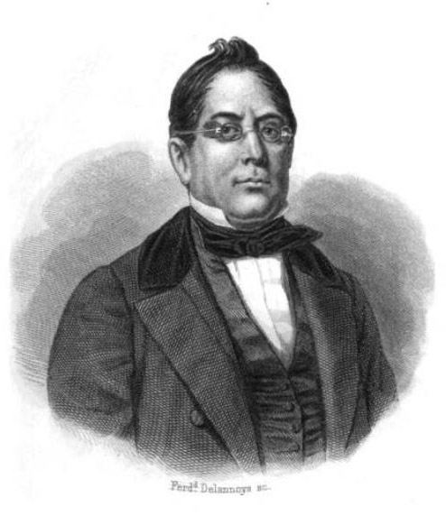 Diego José Benavente Bustamante ( * Concepción, Chile, 1790 – † Santiago, Chile, 1867) fue un político chileno, de destacada participación en la época de la independencia y la organización de la República.